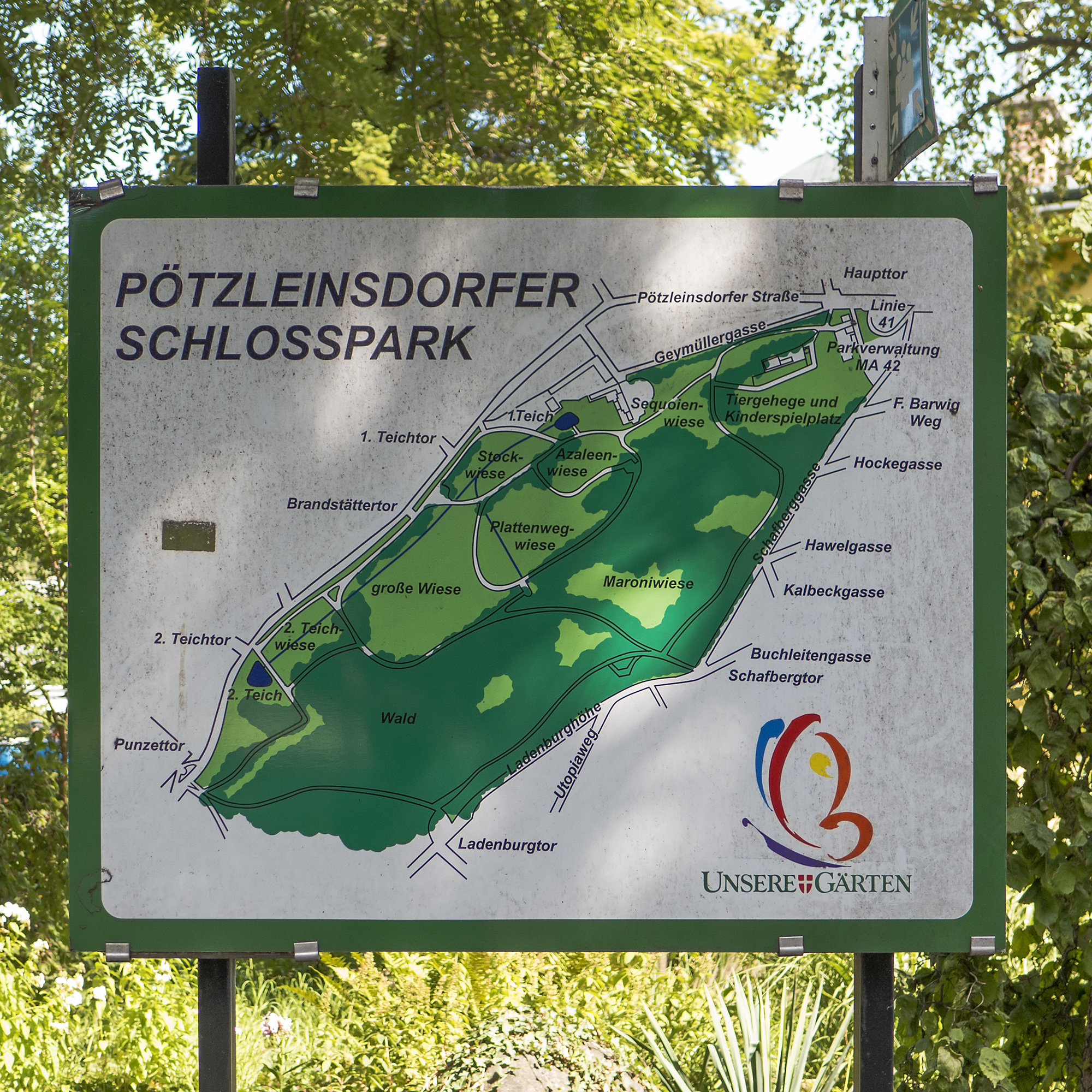 Pötzleinsdorfer Schlosspark in Wien 18